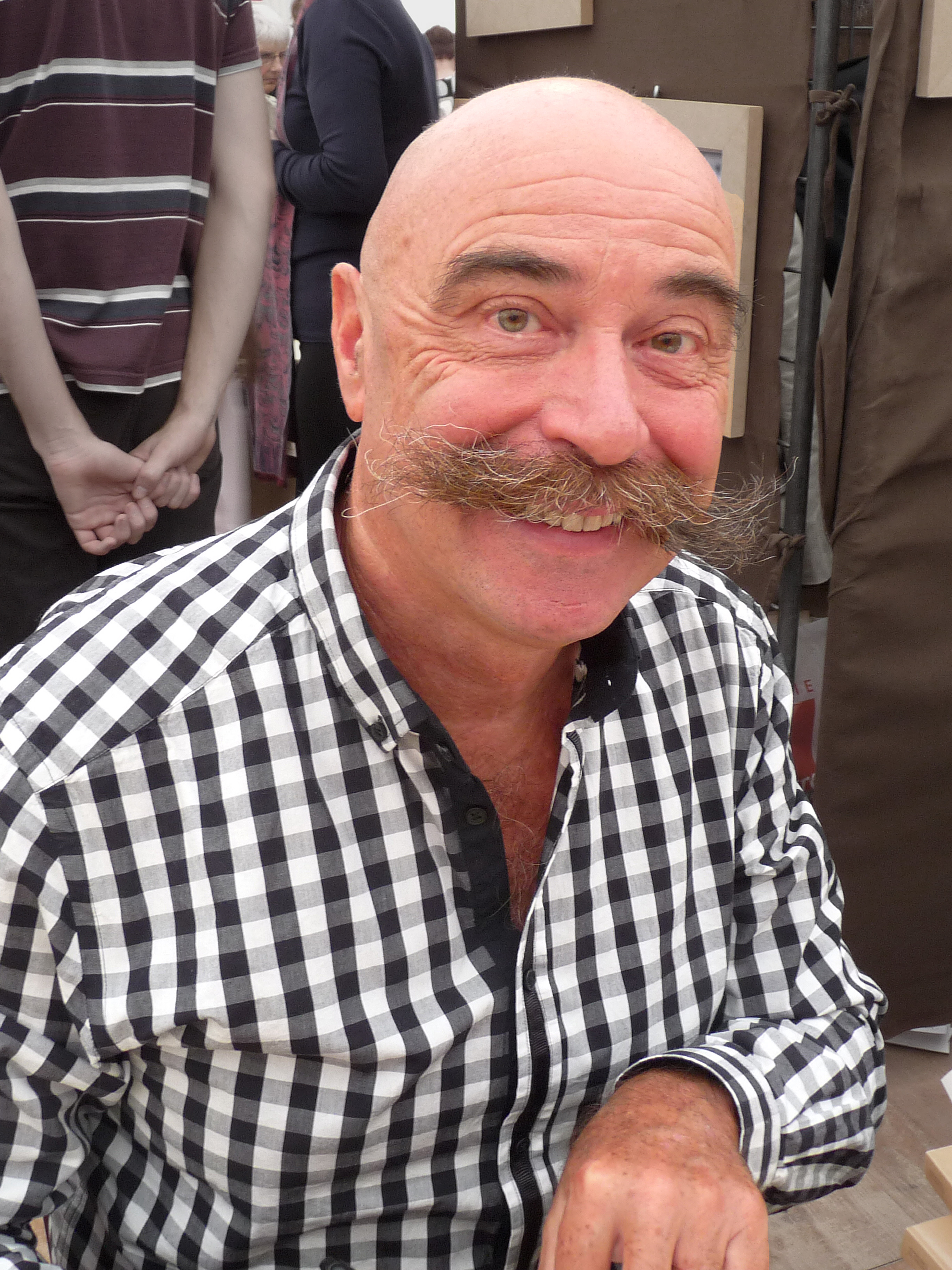 Jean-Claude Kaufmann en dédicace dans le cadre du "Livre sur la Place", Nancy, septembre 2011